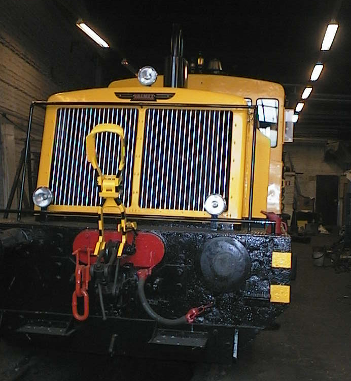 Seikun sahan entinen veturi